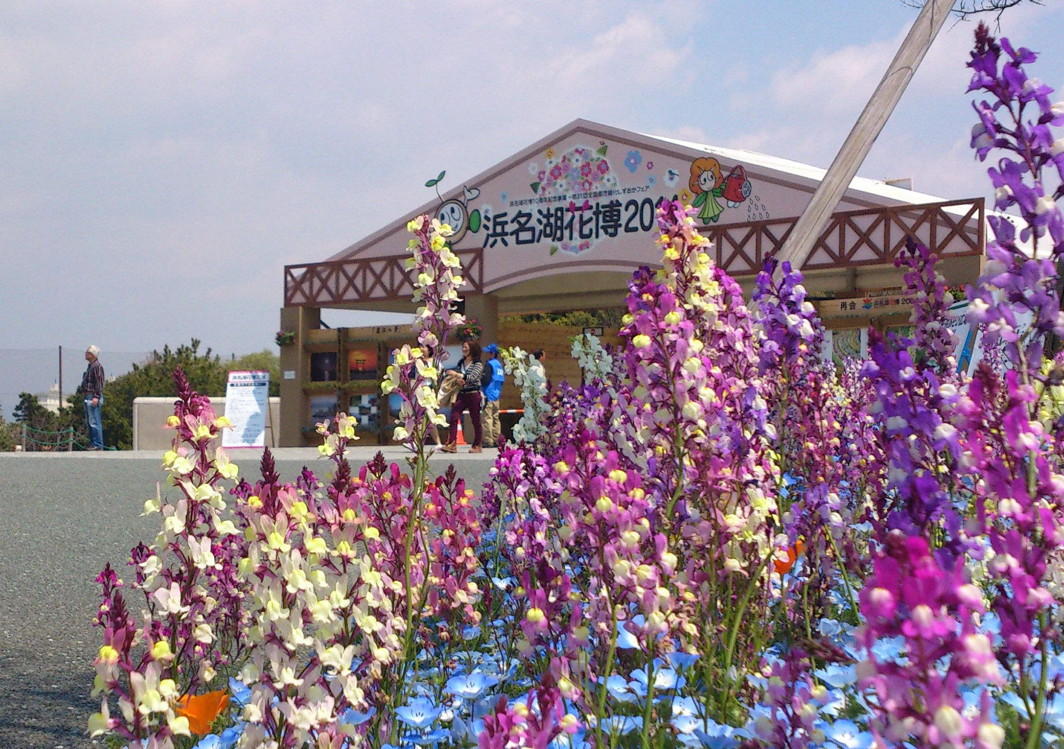 浜名湖ガーデンパーク会場北ゲート